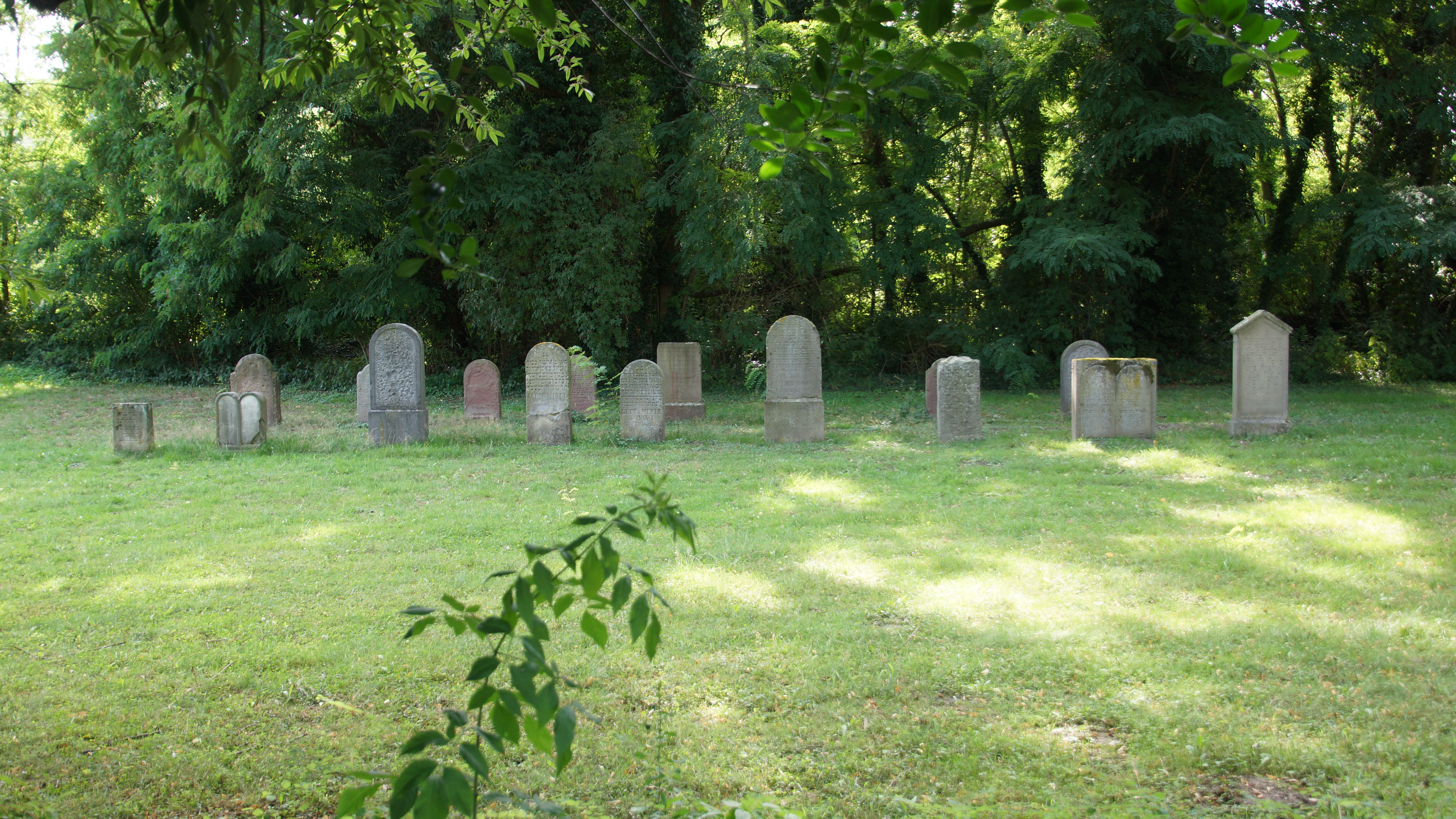 Jüdischer Friedhof Frechen 01